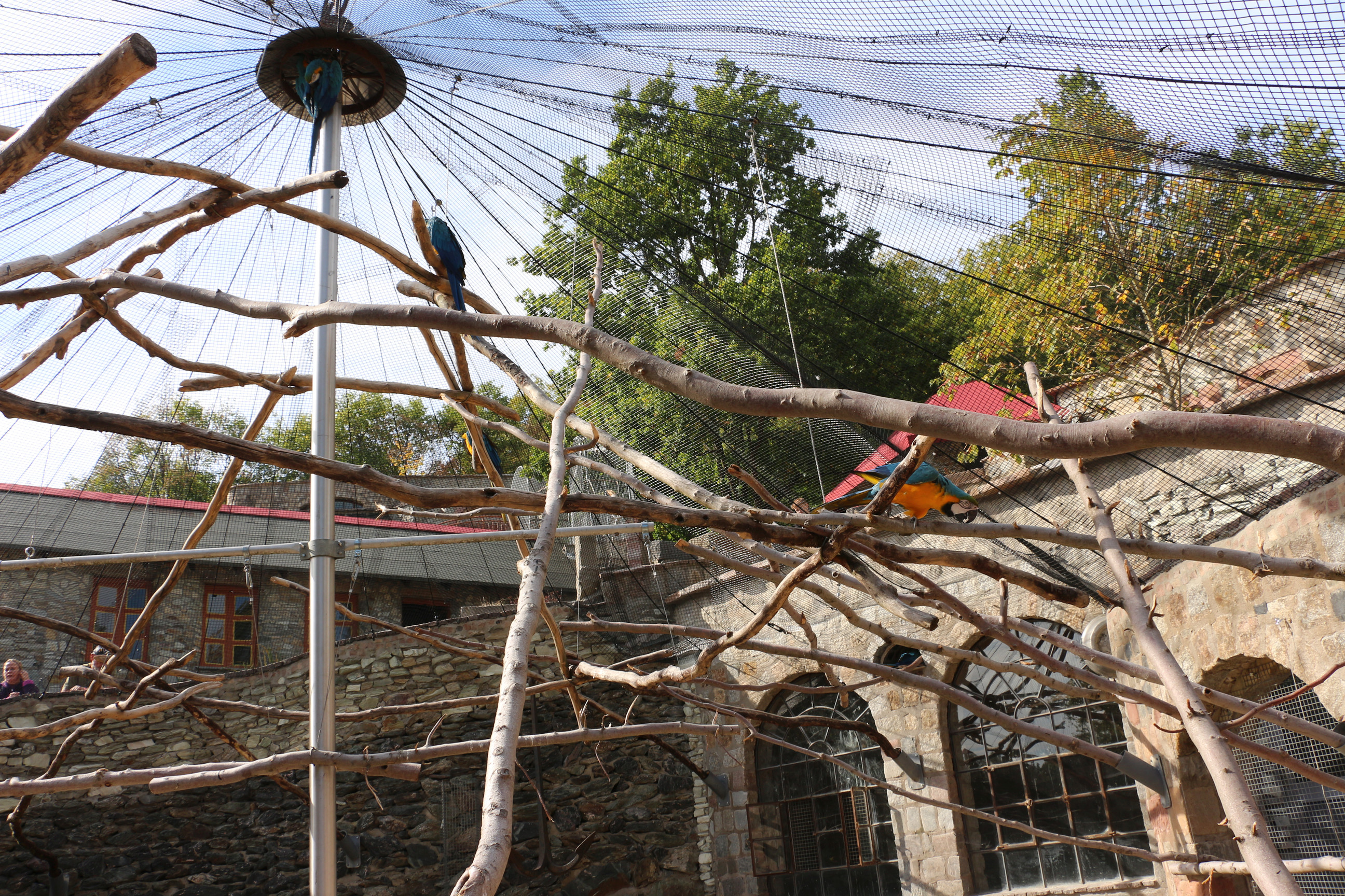 Papageienanlage, begehbar